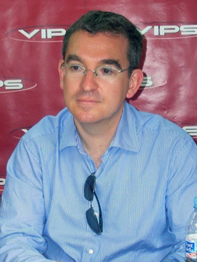 Santiago Posteguillo, en la feria del Libro de Madrid, 2009.